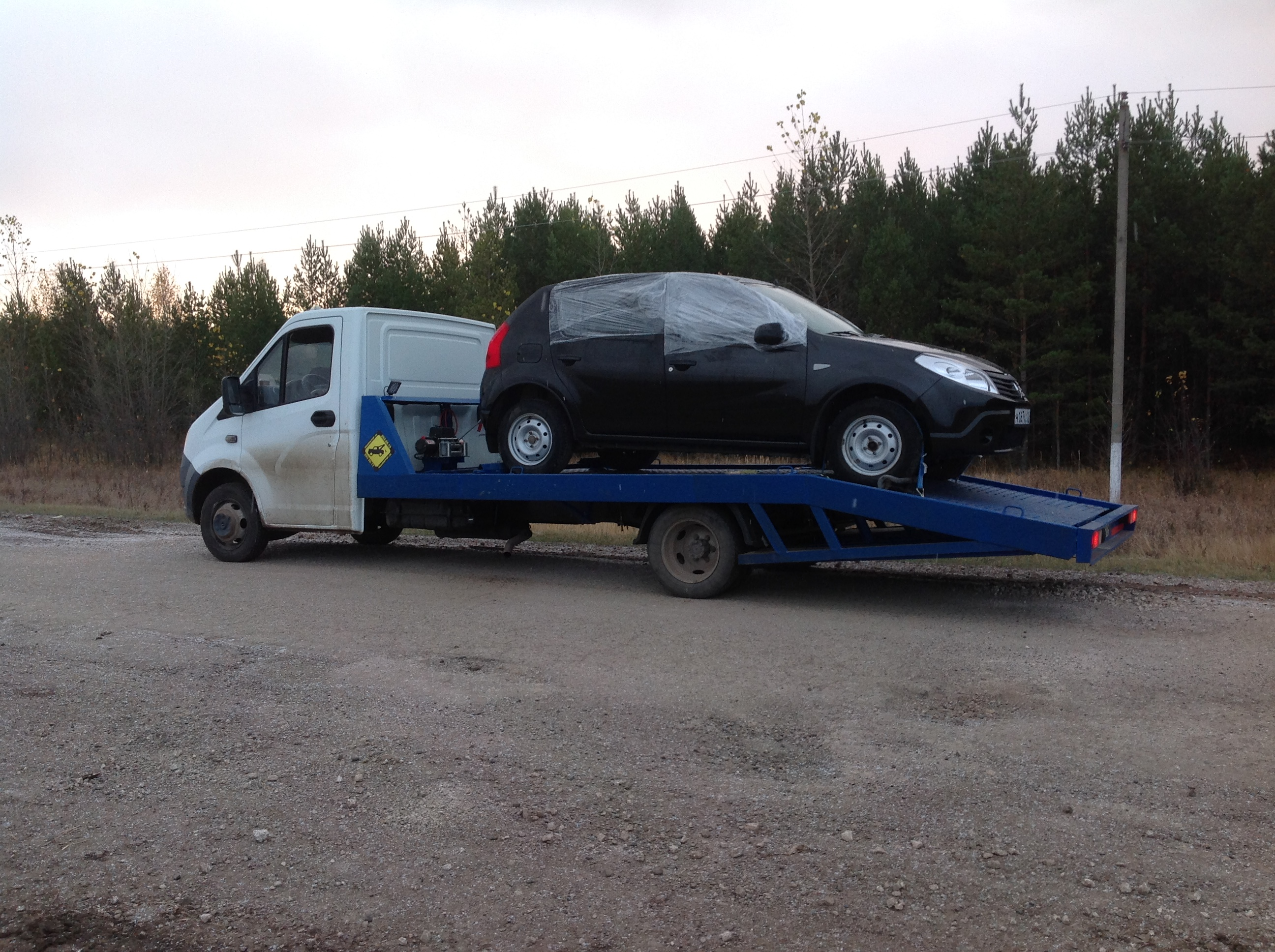 Эвакуатор на базе автомобиля Газель Некст с ломаной платформой.